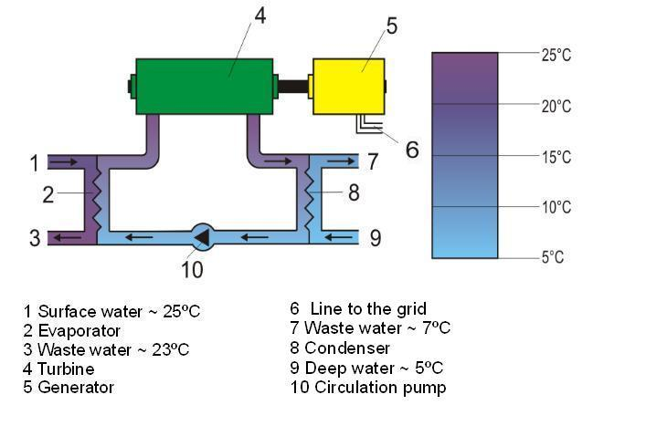 Closed Cycle OTEC diagram